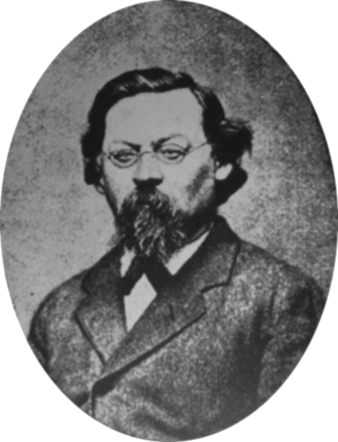 Alexis Langer (1825–1904) German architect.